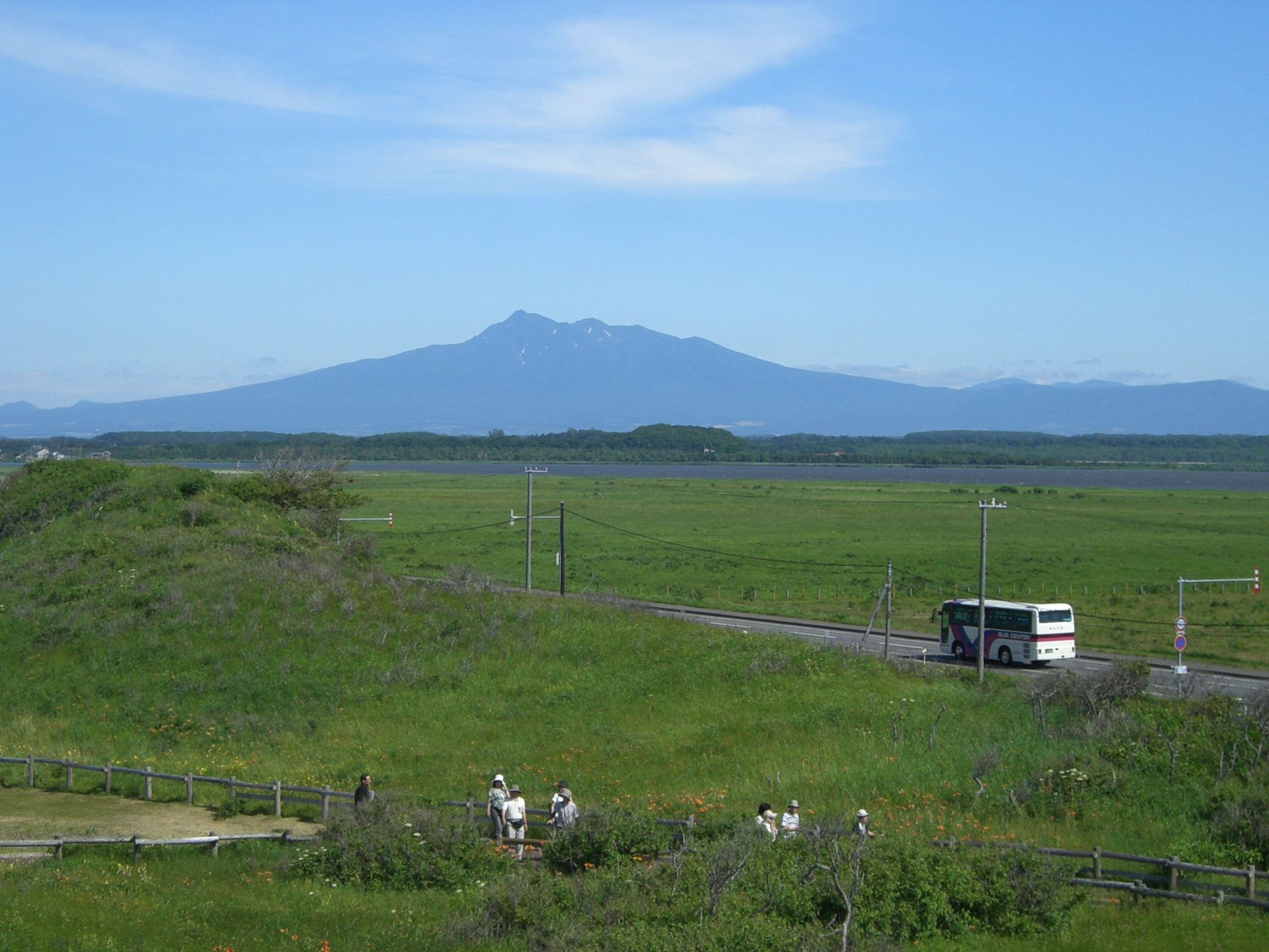 Shari-dake hokkaodo japan 浜小清水原生花園から見た斜里岳